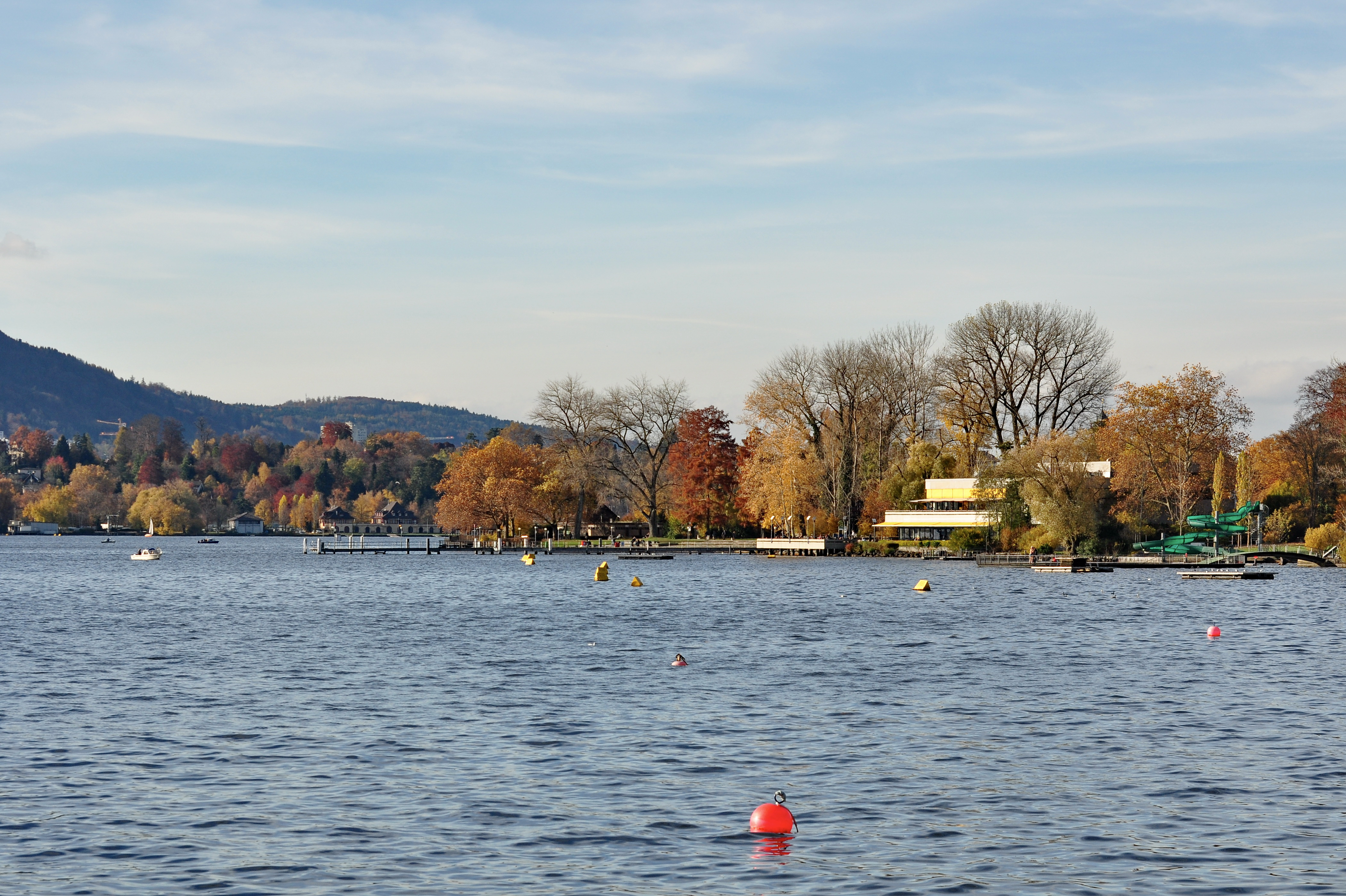 Zürichhorn and Strandbad Tiefenbrunnen in Zürich-Seefeld (Switzerland), as seen from nearby Tiefenbrunnen train station.